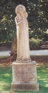 * Date : 25 septembre 2004, vers 15 h 00 Source : photo personnelle d'archeos Description : Copie de ciment d'une statue d'auteur inconnu. Coulée vers 1941. Représente la Vierge à l'Enfant, tous deux pourvus d'une auréole, sur socle. Hauteur totale de l'ensemble : environ 2,2 m. Emplacement : cour de l'abbaye du Pin dans la Vienne. Autres descripteurs : stylisée ; amour maternel : sculpture Licence